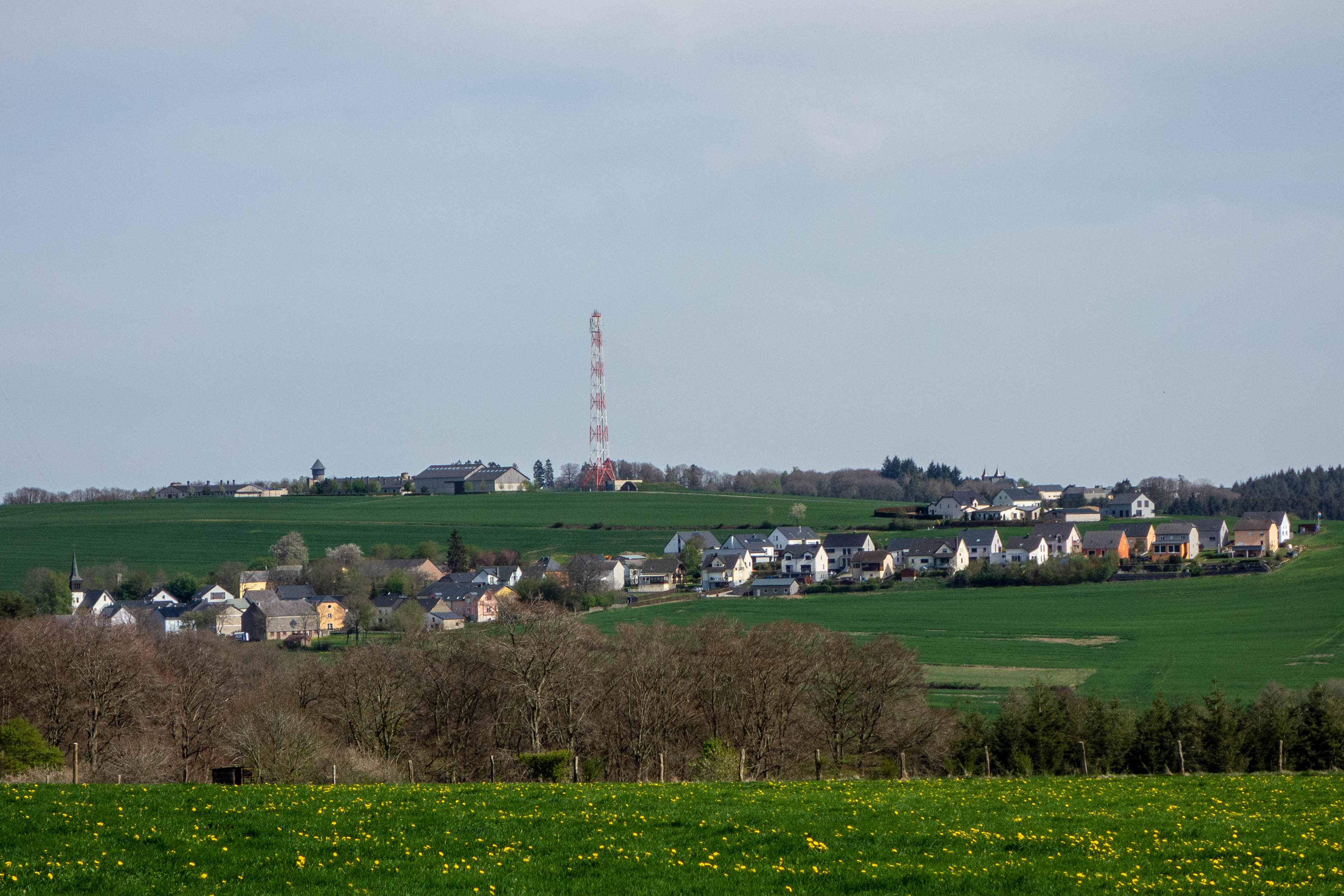 Vue op Näidsen aus Richtung Munzen